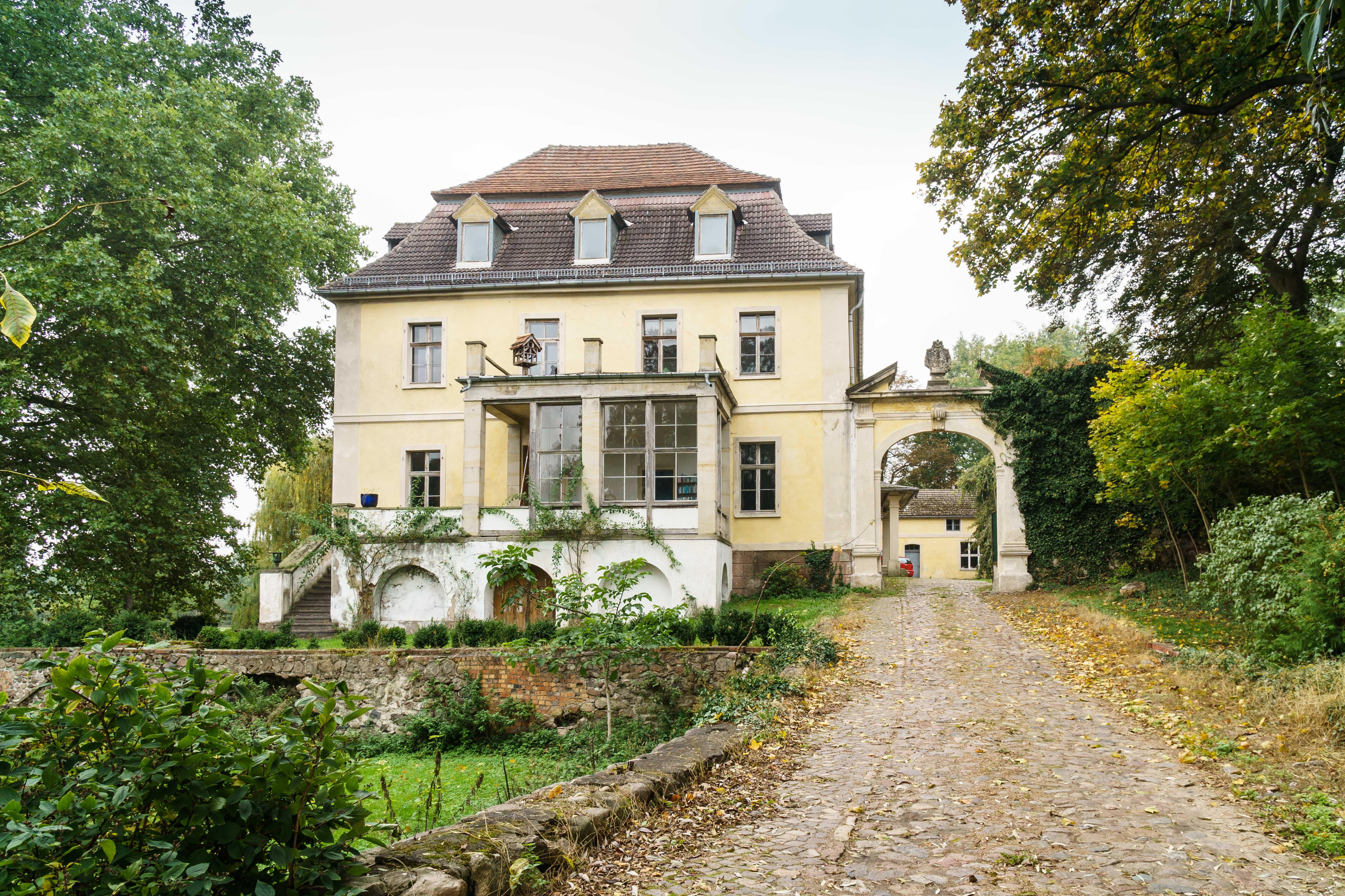 Wasserburg Grabow